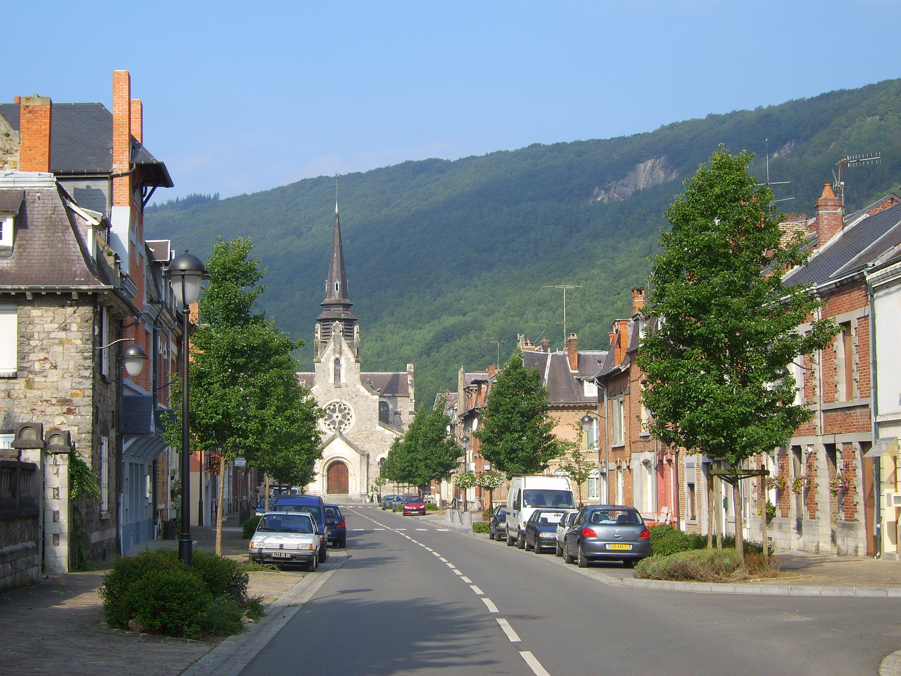 eigen werk Ruben Alexander